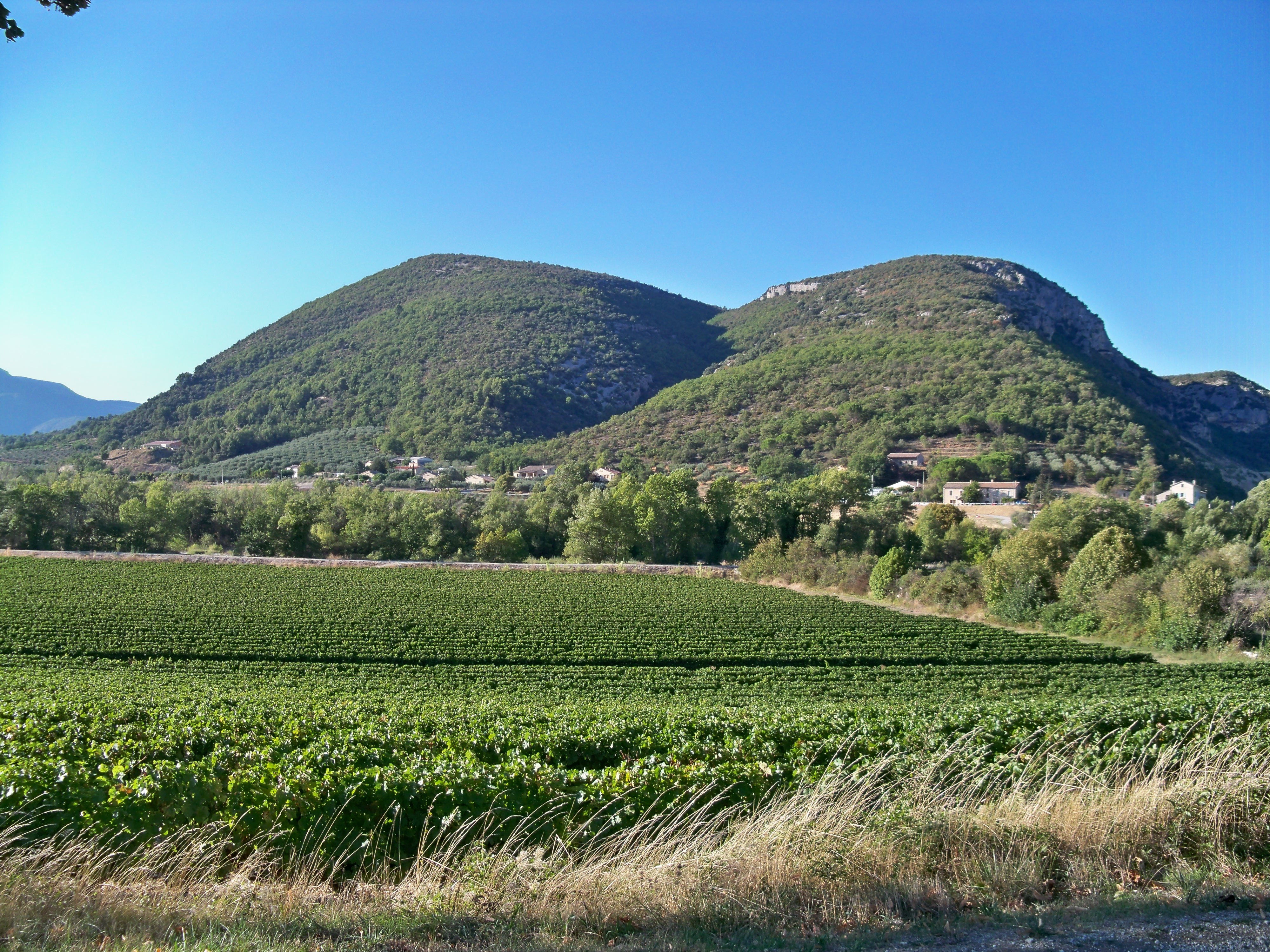 Vignes à Curnier (26)